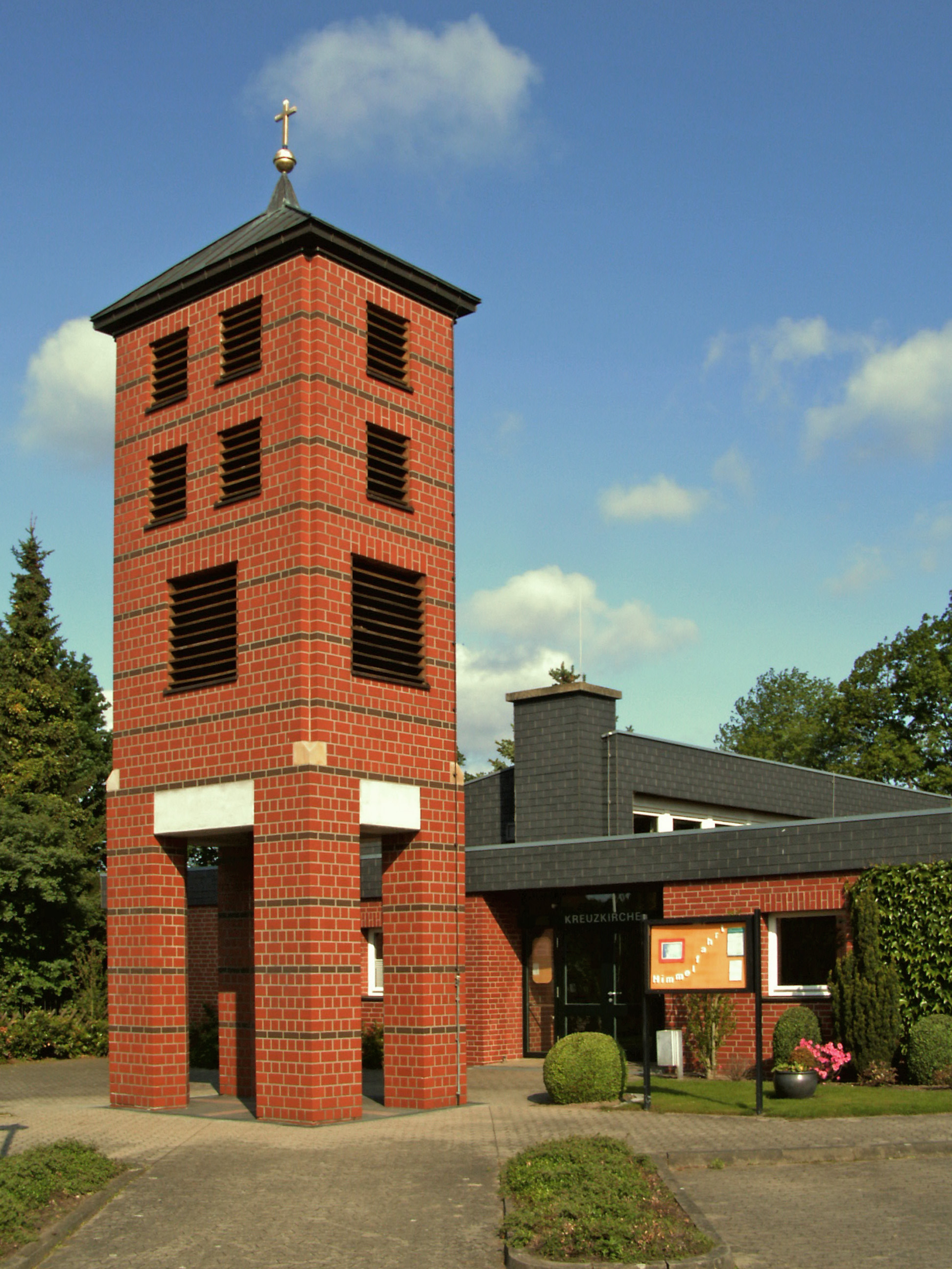 Evangelische Kreuzkirche in Danndorf, Landkreis Helmstedt.